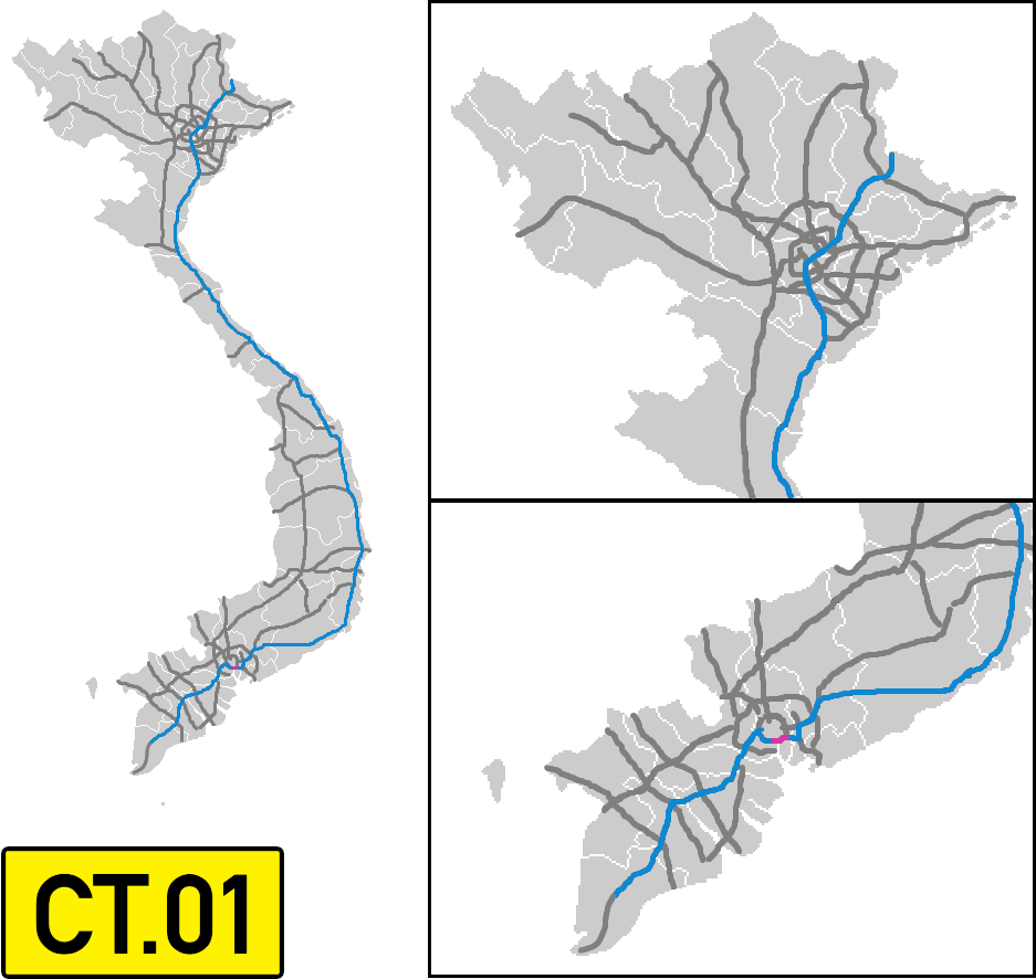 نقشه آزادراه شماره 01، موسوم به آزادراه شمال جنوب (شاخه شرقی)